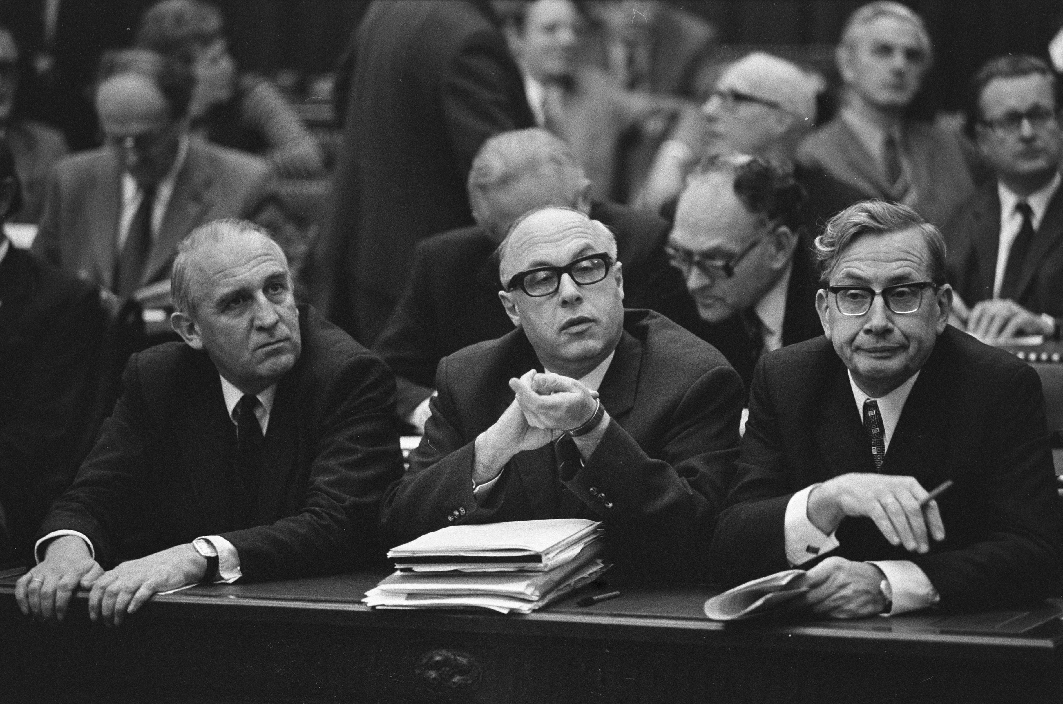 Collectie / Archief : Fotocollectie Anefo Reportage / Serie : Vergadering van de Tweede Kamer Beschrijving : V.l.n.r. Van Rossum , Van Dis en Abma (allen SGP) Datum : 8 november 1973 Locatie : Den Haag, Zuid-Holland Trefwoorden : kamerleden, politici Persoonsnaam : Abma, H.G., Dis, C.N. van, Rossum, H. van Fotograaf : Fotograaf Onbekend / Anefo Auteursrechthebbende : Nationaal Archief Materiaalsoort : Negatief (zwart/wit) Nummer archiefinventaris : bekijk toegang 2.24.01.05 Bestanddeelnummer : 926-8138